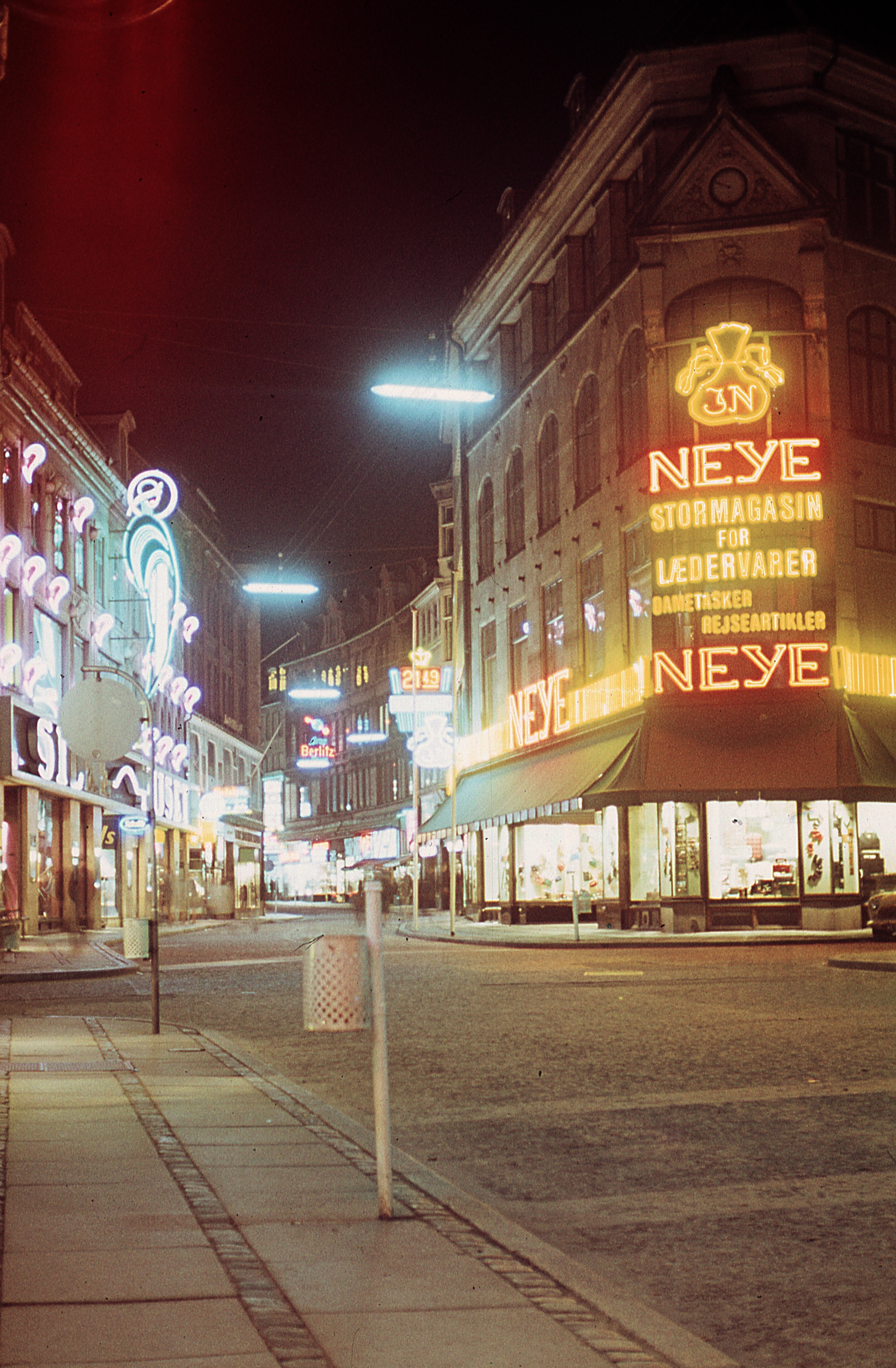 Vimmelskaftet az Amagertorv felől nézve. Location: Denmark, Copenhagen Tags: neon sign, colorful Title: Vimmelskaftet az Amagertorv felől nézve.